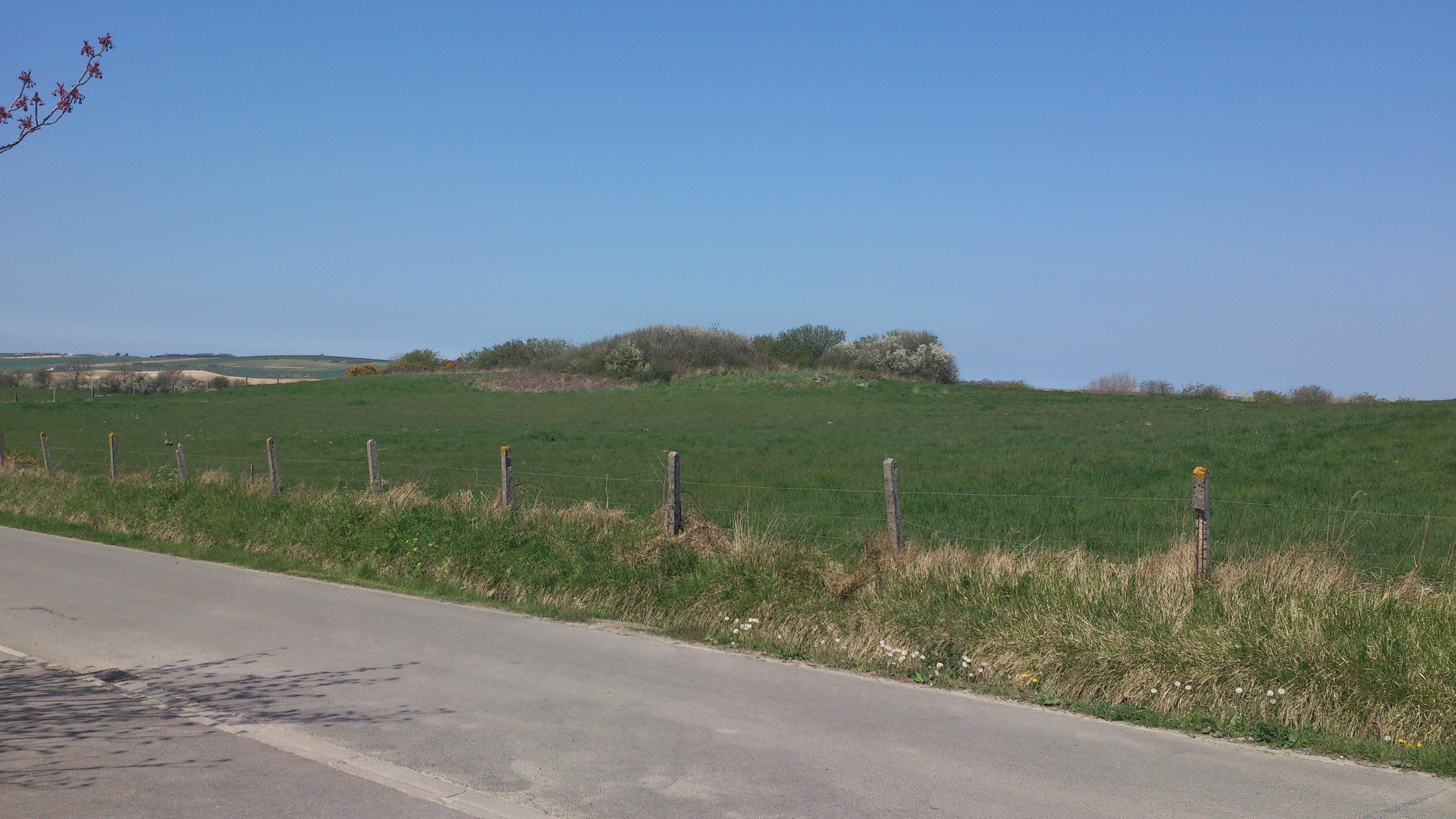 Voici une vu d'ensemble de la légende des Neuches.